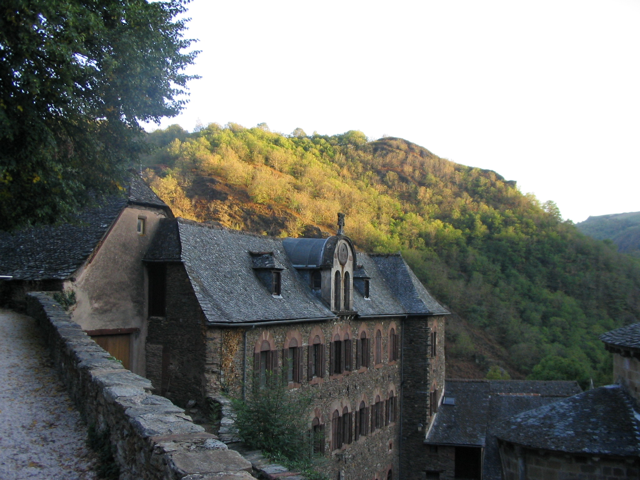 Conques hermitage